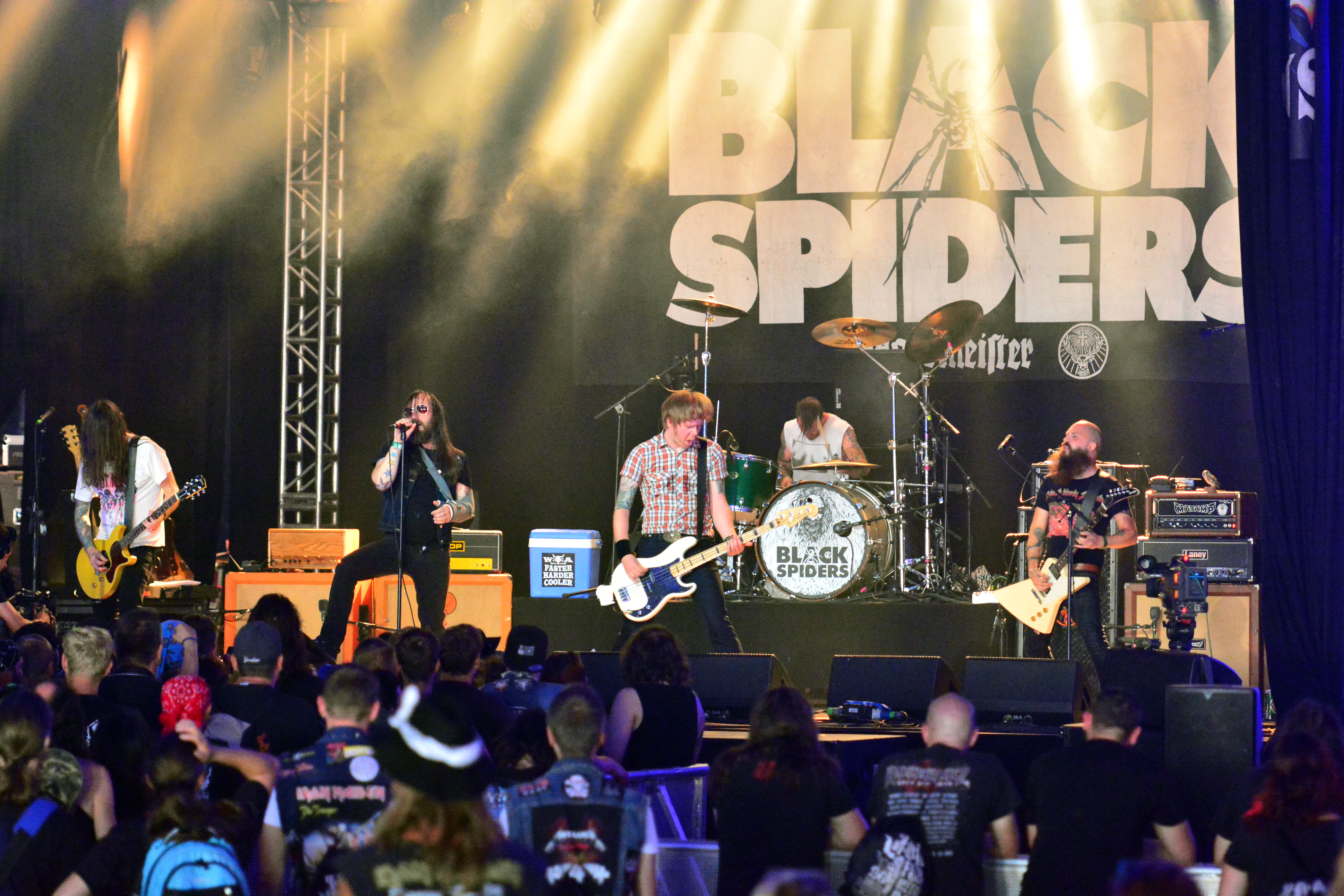 The Black Spiders beim Wacken Open Air 2015